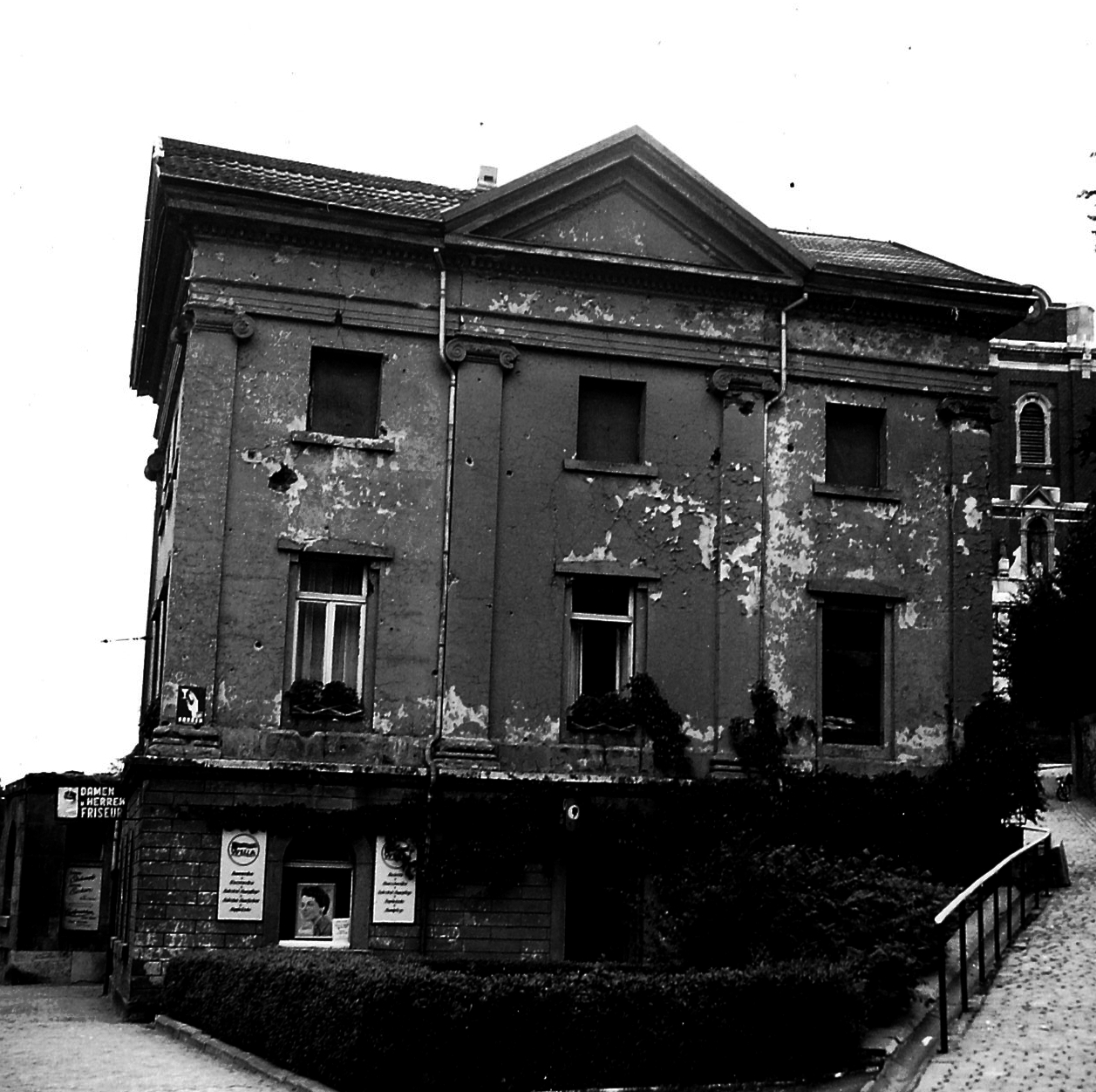 Das ehemalige Rathaus in Burtscheid, Zustand vor der Rekonstruktion 1954